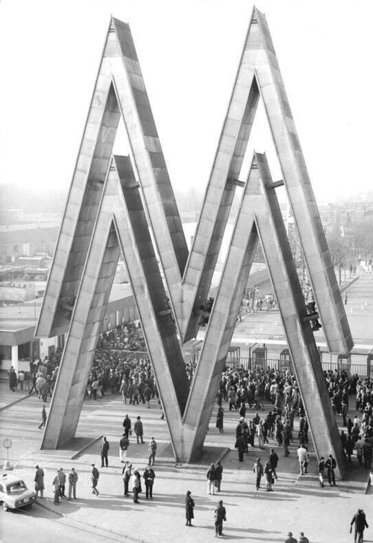 Leipzig, Frühjahrsmesse, Nordeingang ADN-ZB Lehmann 16.3.83 Leipzig: Frühjahrsmesse-Unter dem traditionellen Motte "Für friedlichen Handel und technischen Fortschritt" zeigen rund 9000 Aussteller aus aller Welt ihr Angebot auf der Frühjahrsmesse.